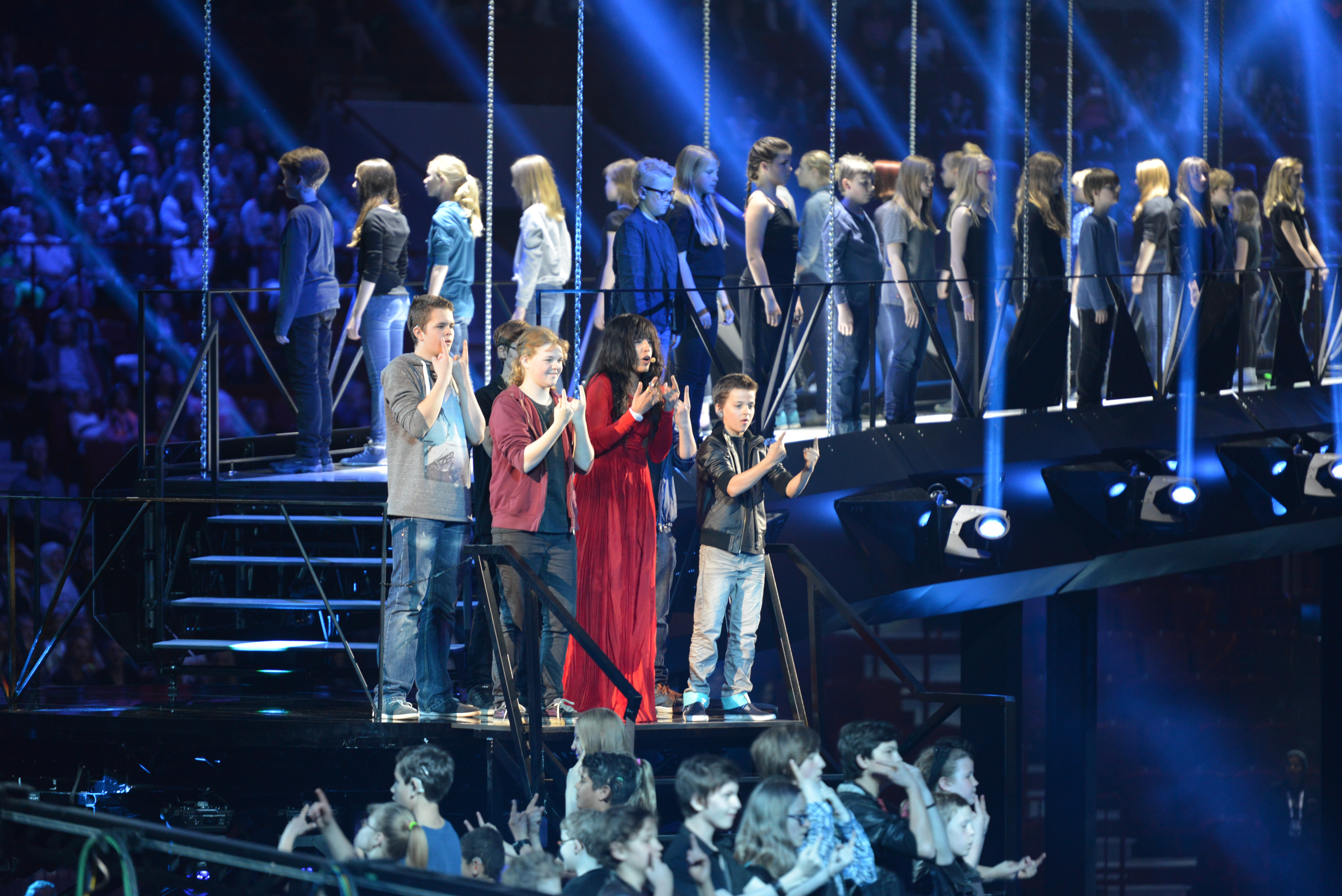 Loreen ESC2013 intro 1